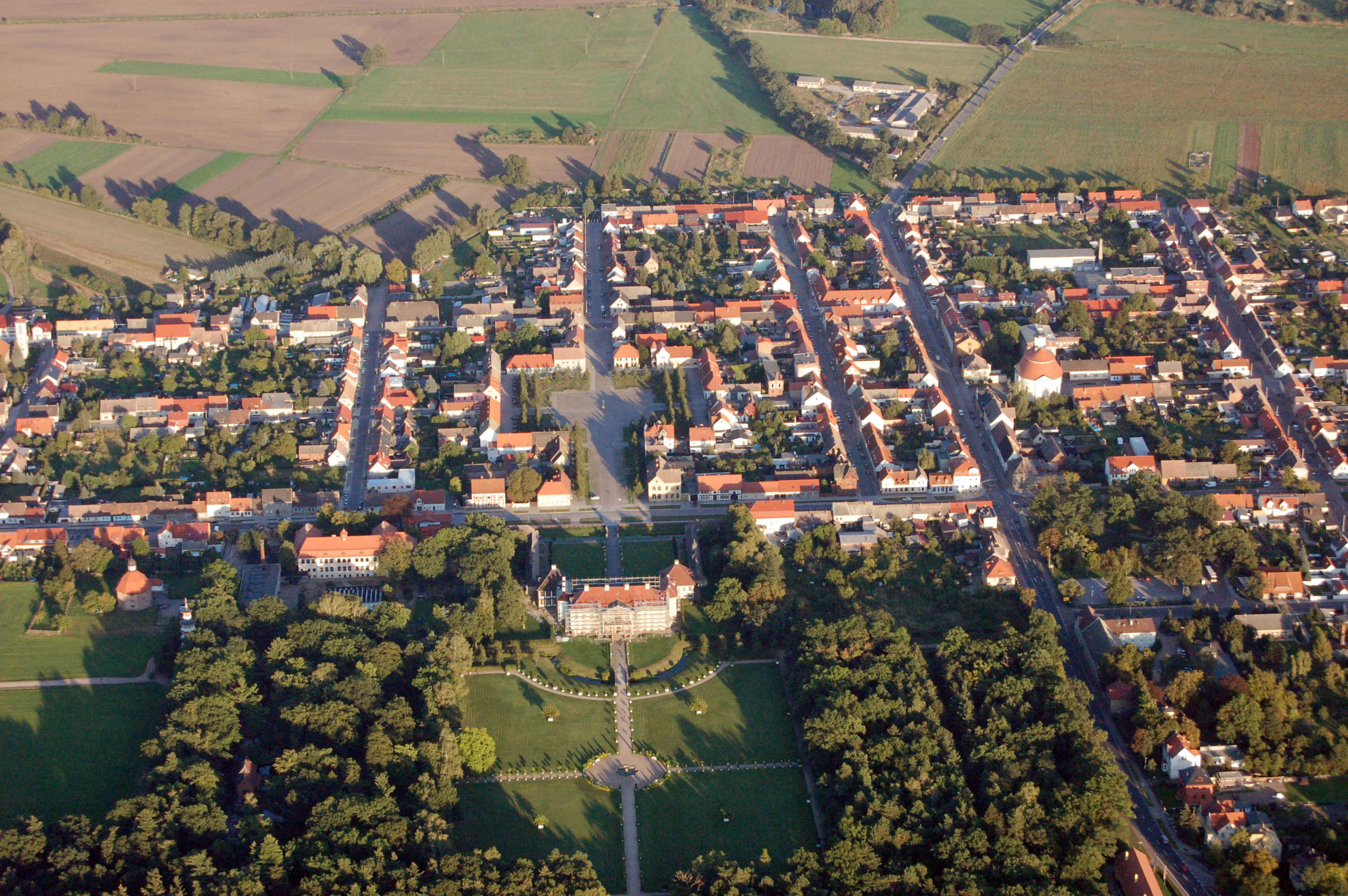 Luftbild der Stadt Oranienbaum